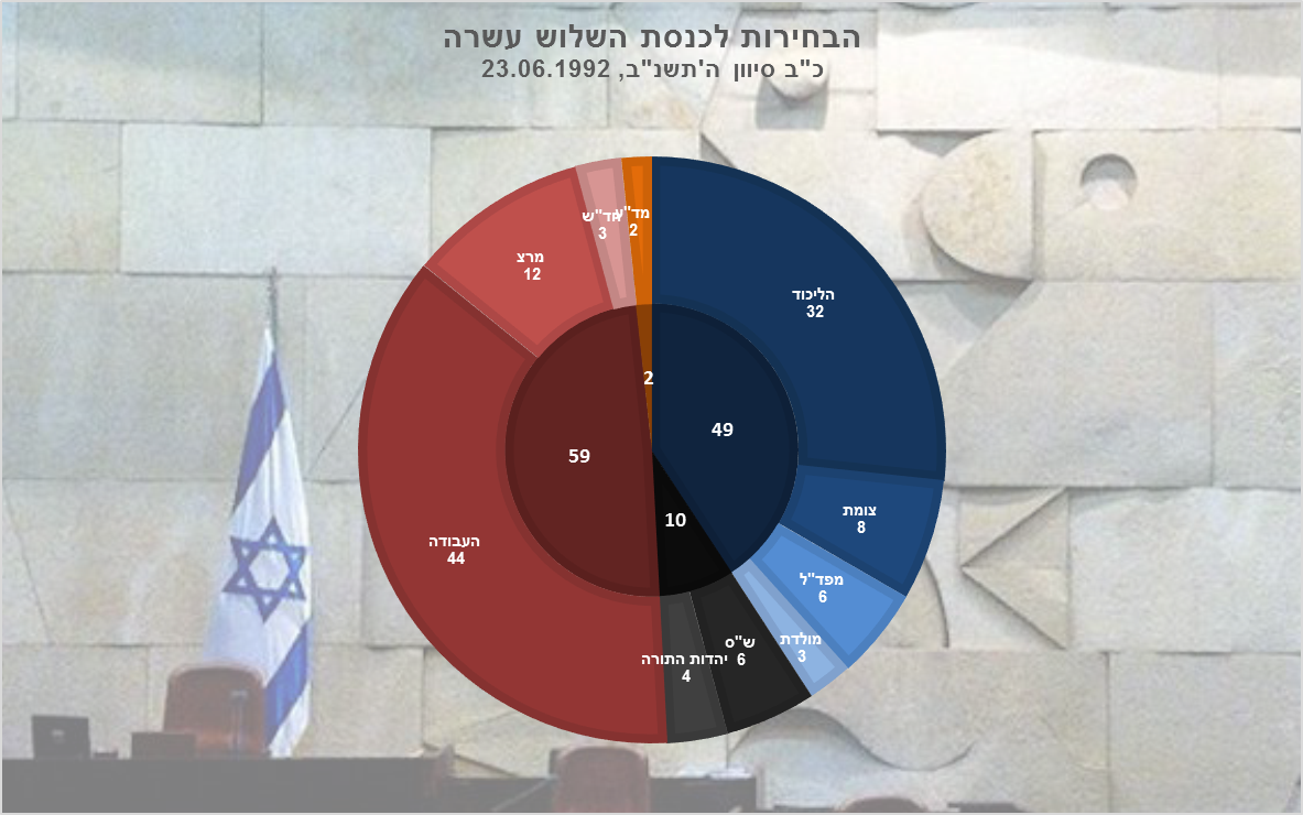 תוצאות הבחירות לכנסת השלוש עשרה